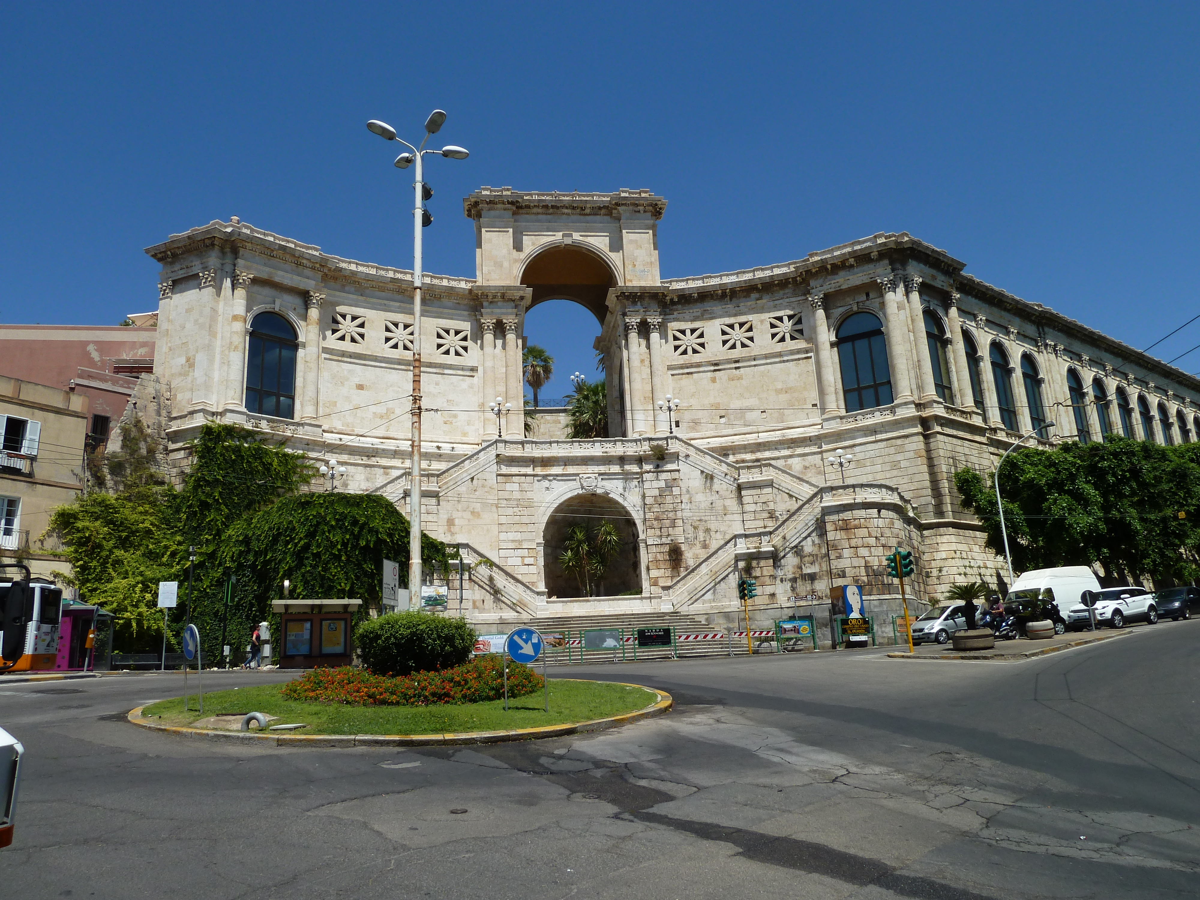 piazza della Costituzione Cagliari